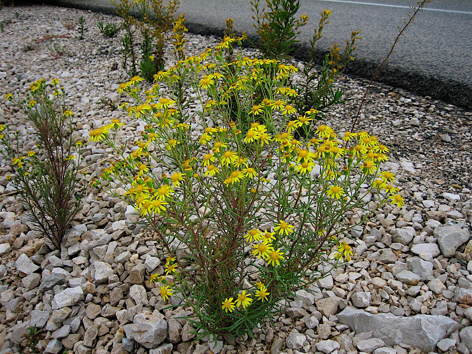 Senecio nevadensis ssp malacitanus